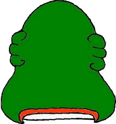 Glifo de Progreso, Hidalgo